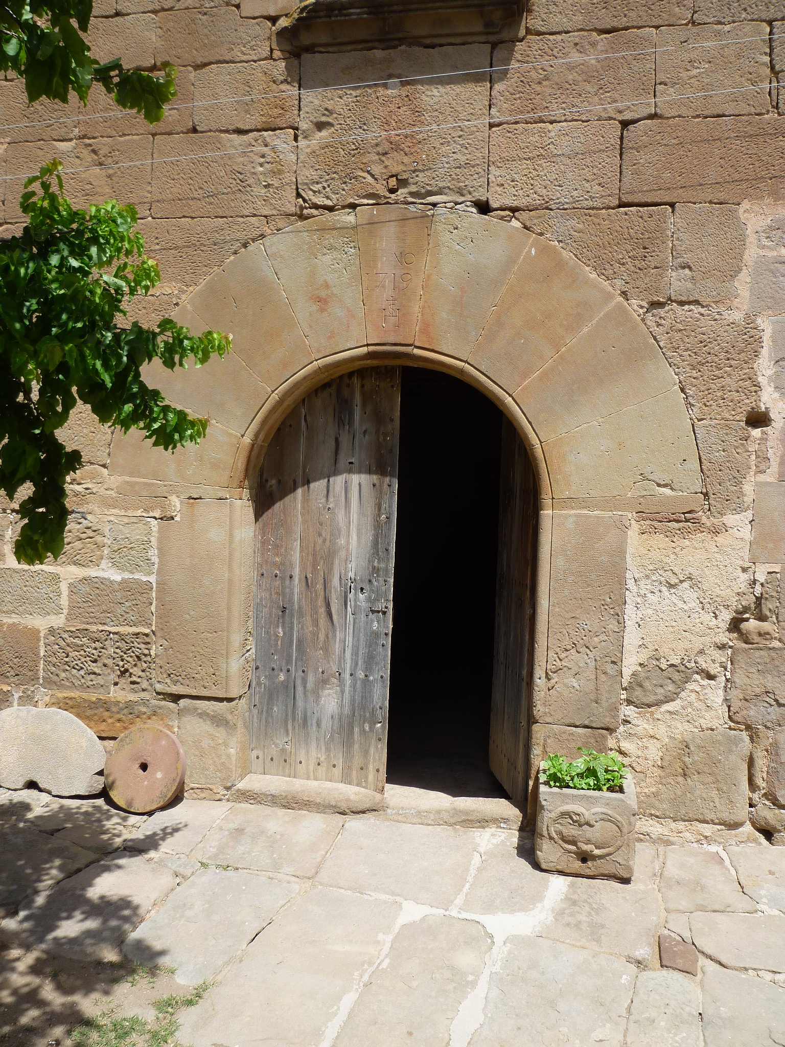 Portal d'entrada a la masia de Casamartina de Freixenet de Riner